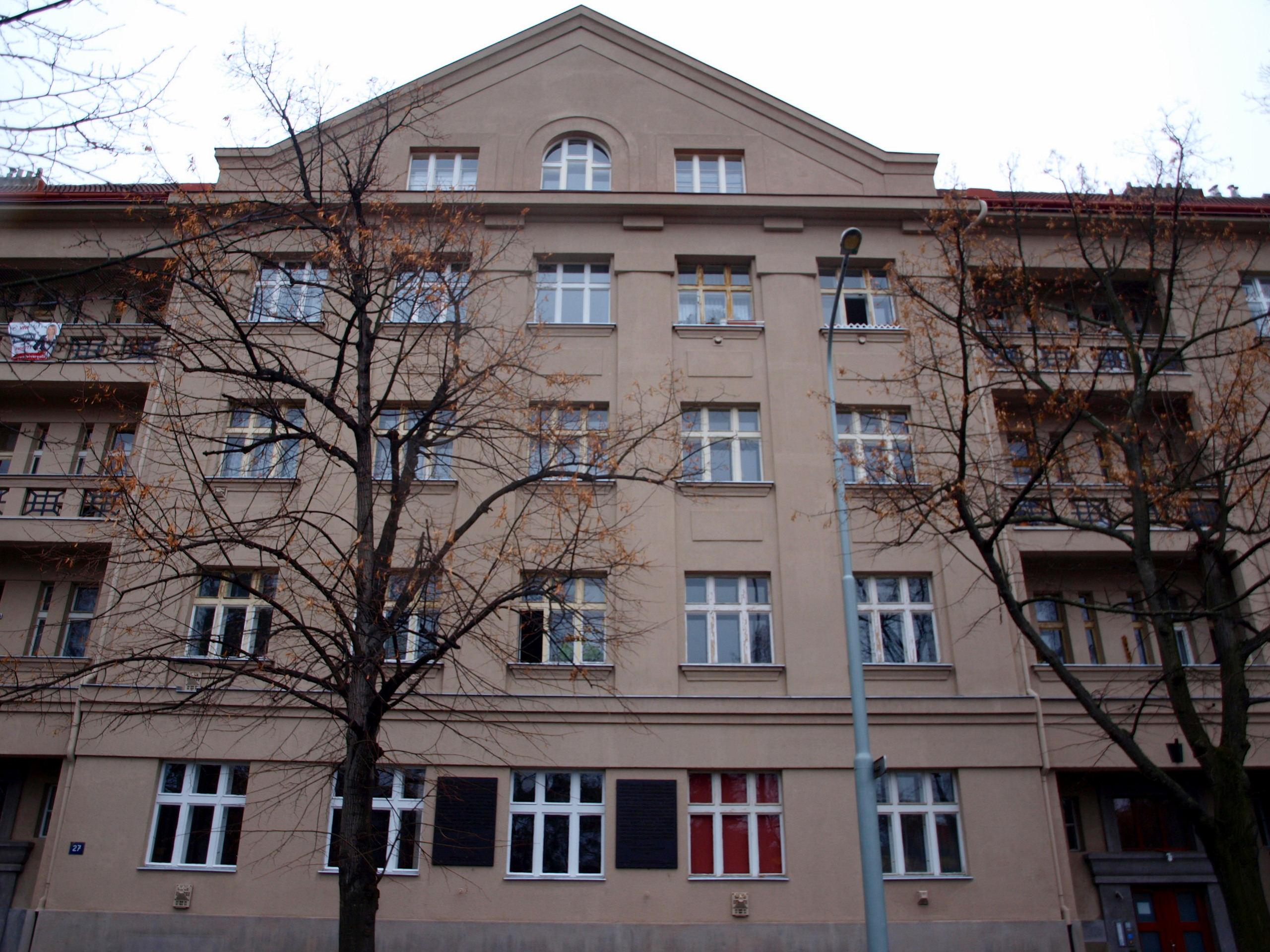 Dejvice, ruský dům s chrámem sv. Mikuláše cedule